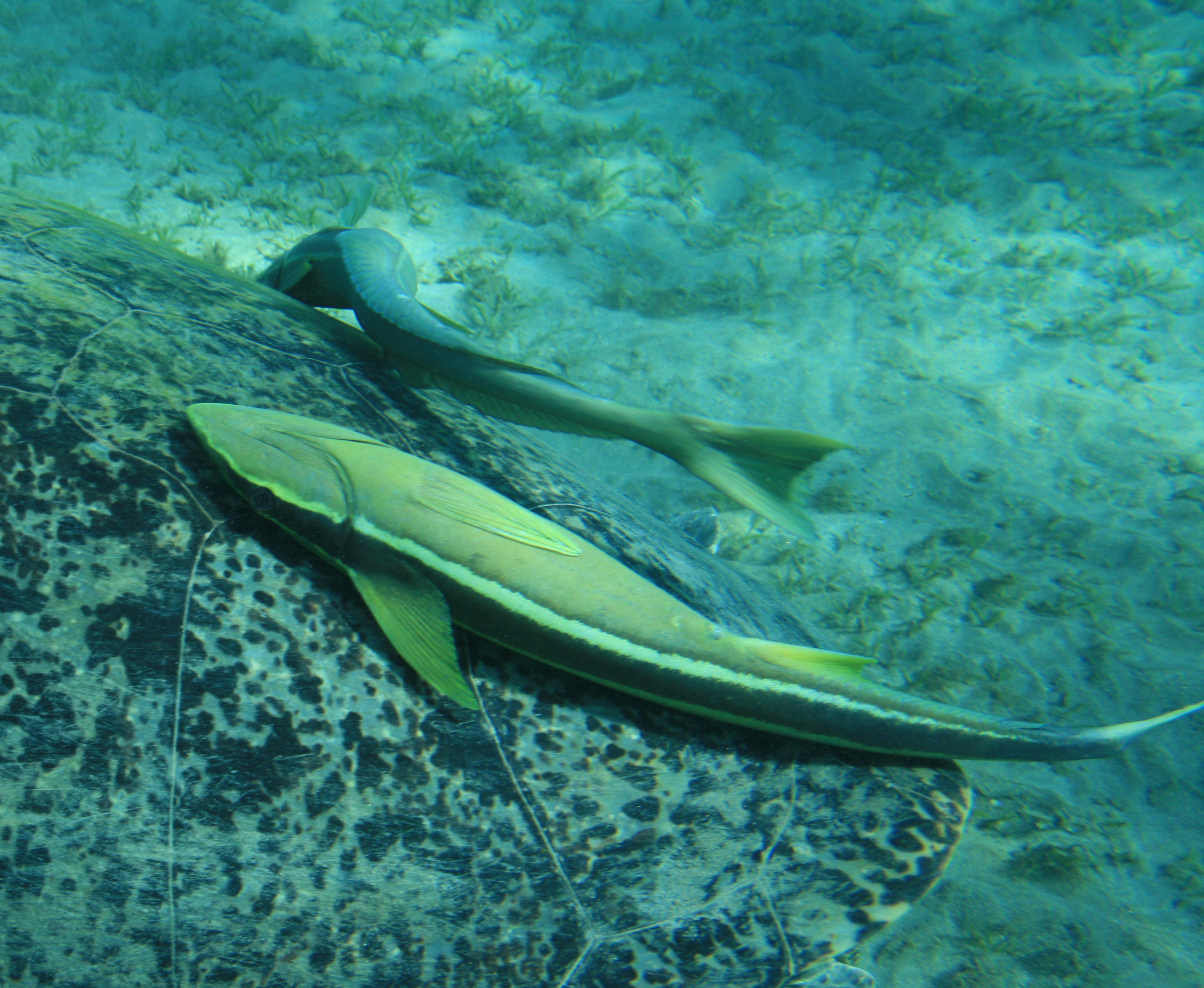 Рыба прилипала на черепахе, Красное море